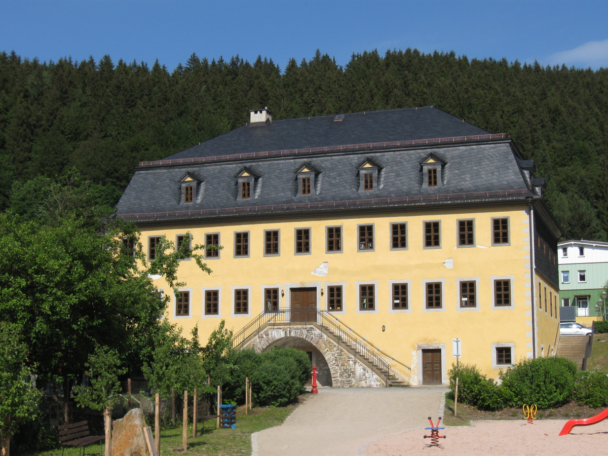 Dieses herrschaftliche Haus ließ Johann Wolfgang Hammann im Jahre 1760 für sich und seine Familie bauen. Es war viele Jahre der Sitz der Fürstlich-Schwarzburgischen Hütteninspektion. Heute befinden sich in dem Gebäude das Büro des Bürgermeisters, die Touristinformation und die Gemeindebibliothek.